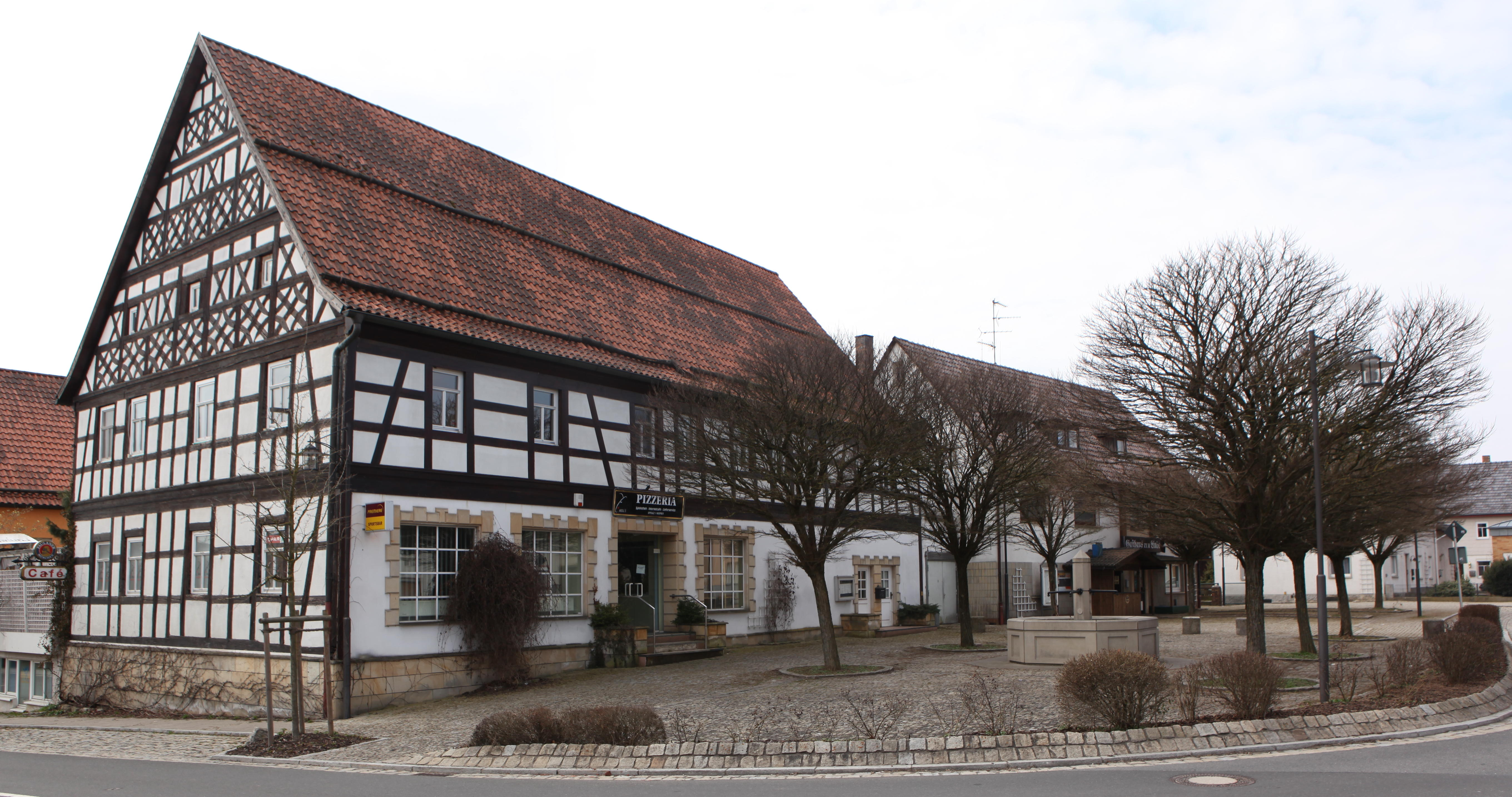 Satteldachbau mit Fachwerkgiebel des 17. Jh., Hauptstraße 1 in Frohnlach, Landkreis Coburg